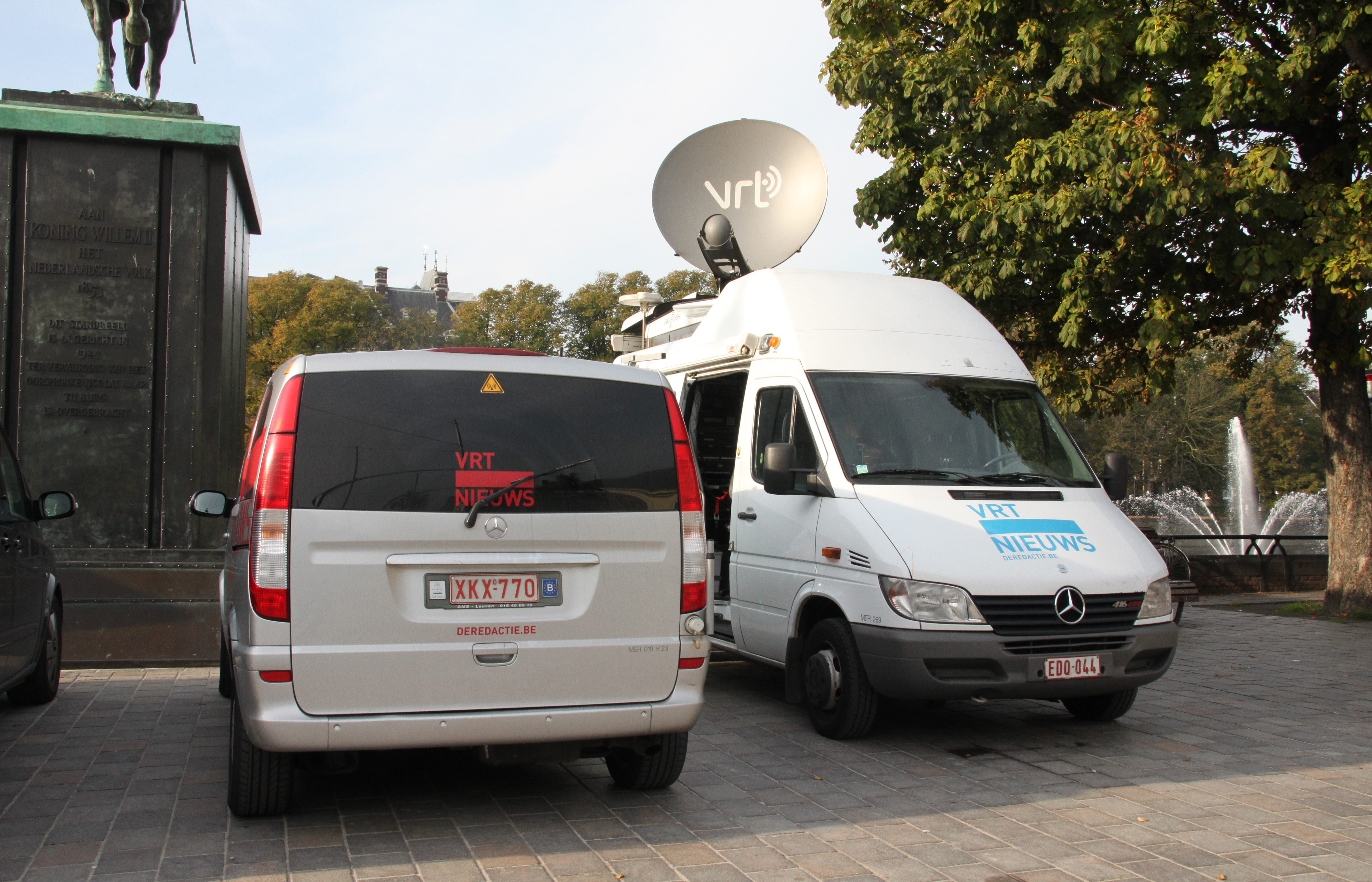 Straalwagen van het VRT Nieuws in Den Haag.